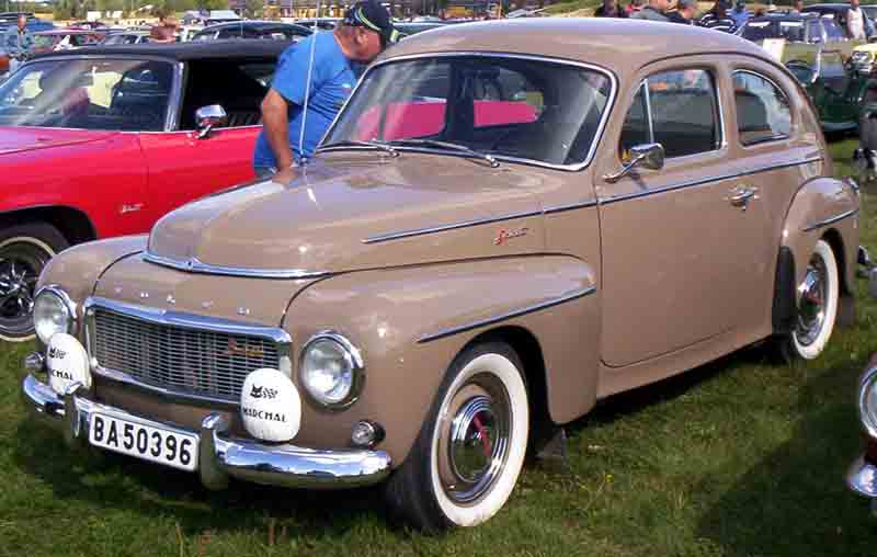 Volvo PV544 Sport 2-Door Sedan